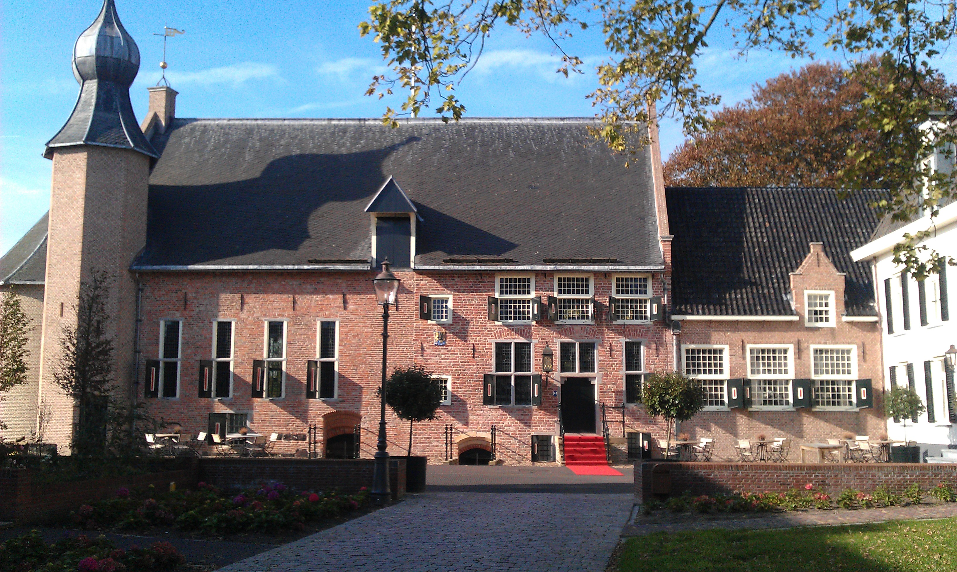 Kasteel van Coevorden in de herfstzon.